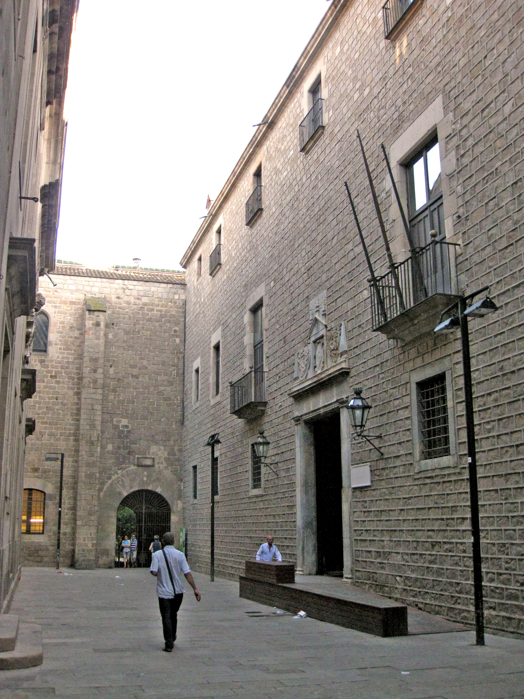 Façana interior de la Casa de Convalescència (Pere Pau Ferrer i Pere Vidal, 1629-1680), dins el conjunt de l’antic Hospital de la Santa Creu. Avui allotja l’Institut d’Estudis Catalans.